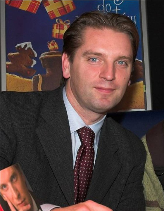 Tomasz Lis (ur. 6 marca 1966 w Zielonej Górze) – polski dziennikarz telewizyjny, publicysta